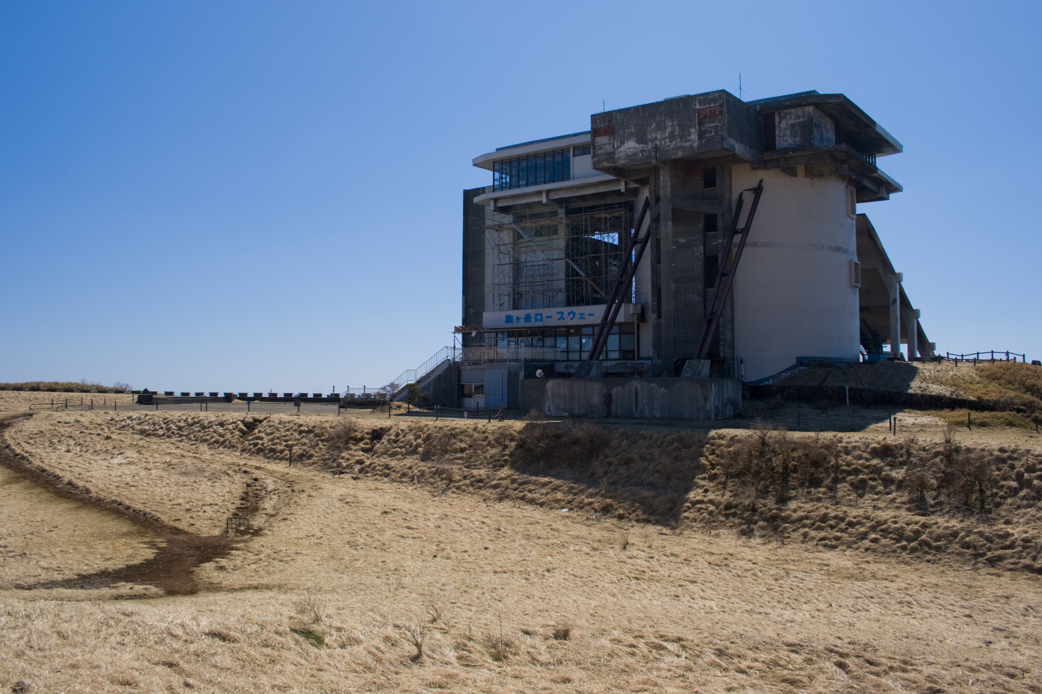 箱根駒ヶ岳ロープウェイ 駒ヶ岳頂上駅